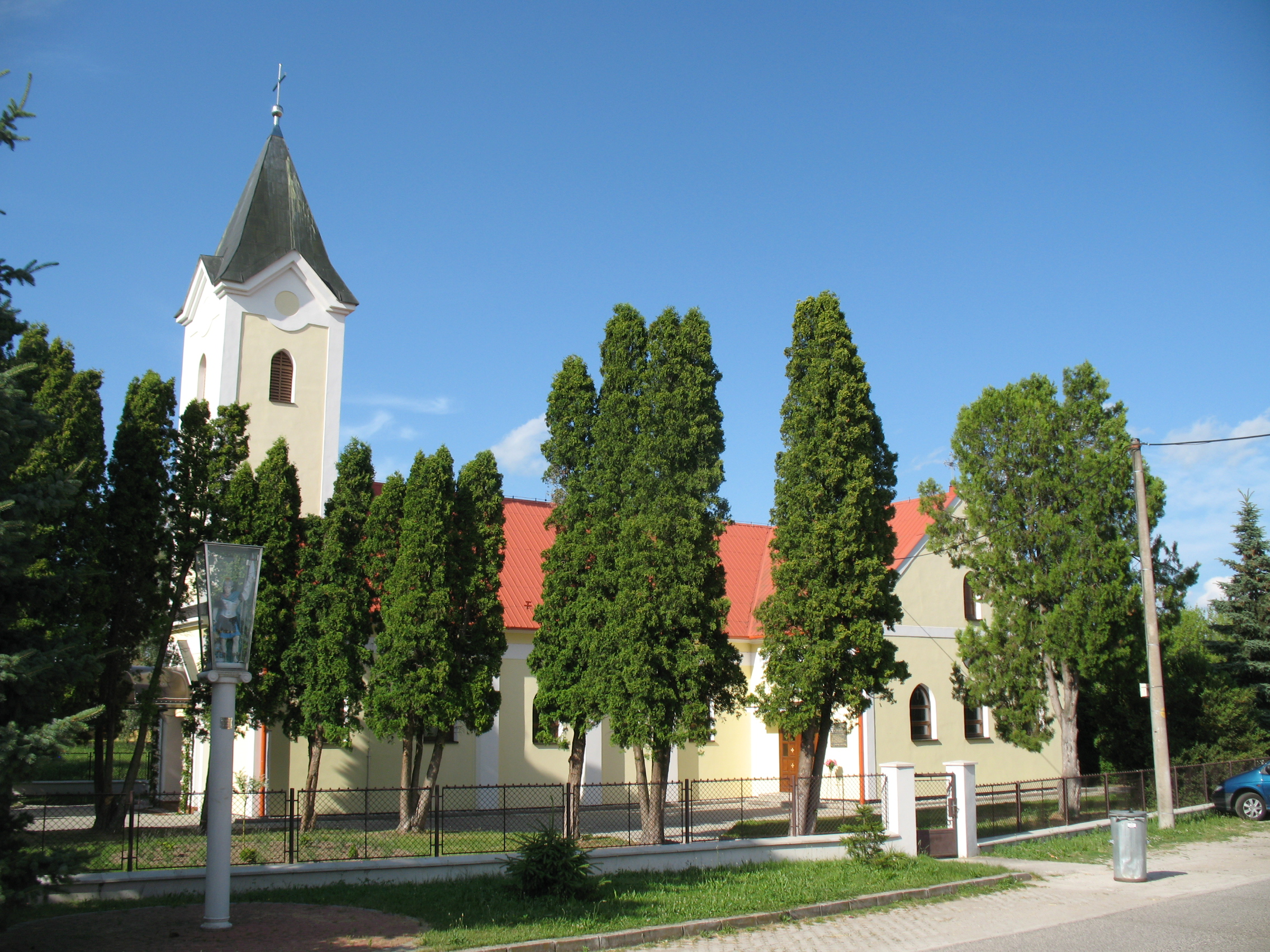 Nyitragaráb